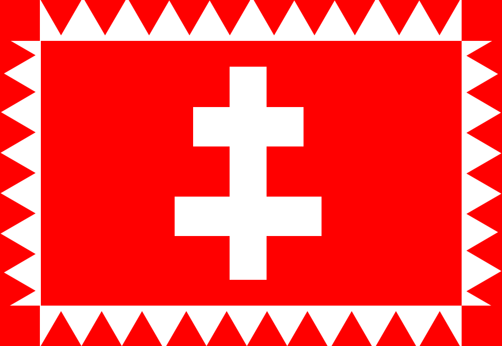 Drapeaux de guerre lorrain, à la croix de lorraine